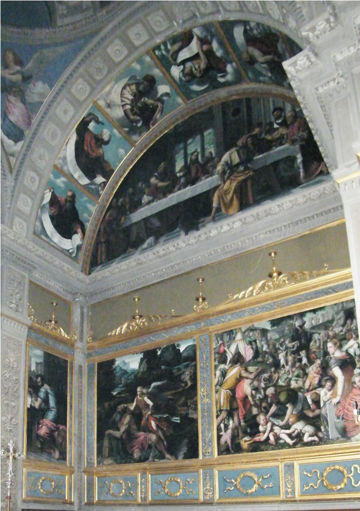 Elia confortato dall'angelo - La raccolta della manna (Moretto) - Chiesa di S. Giovanni Evangelista - Brescia